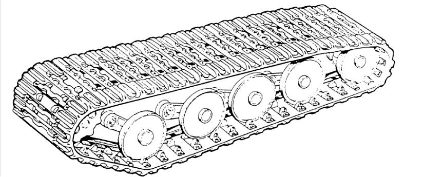 Гусеничная лента, применяется на снегоболотоходах ГАЗ-3351